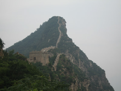 北京司马台长城